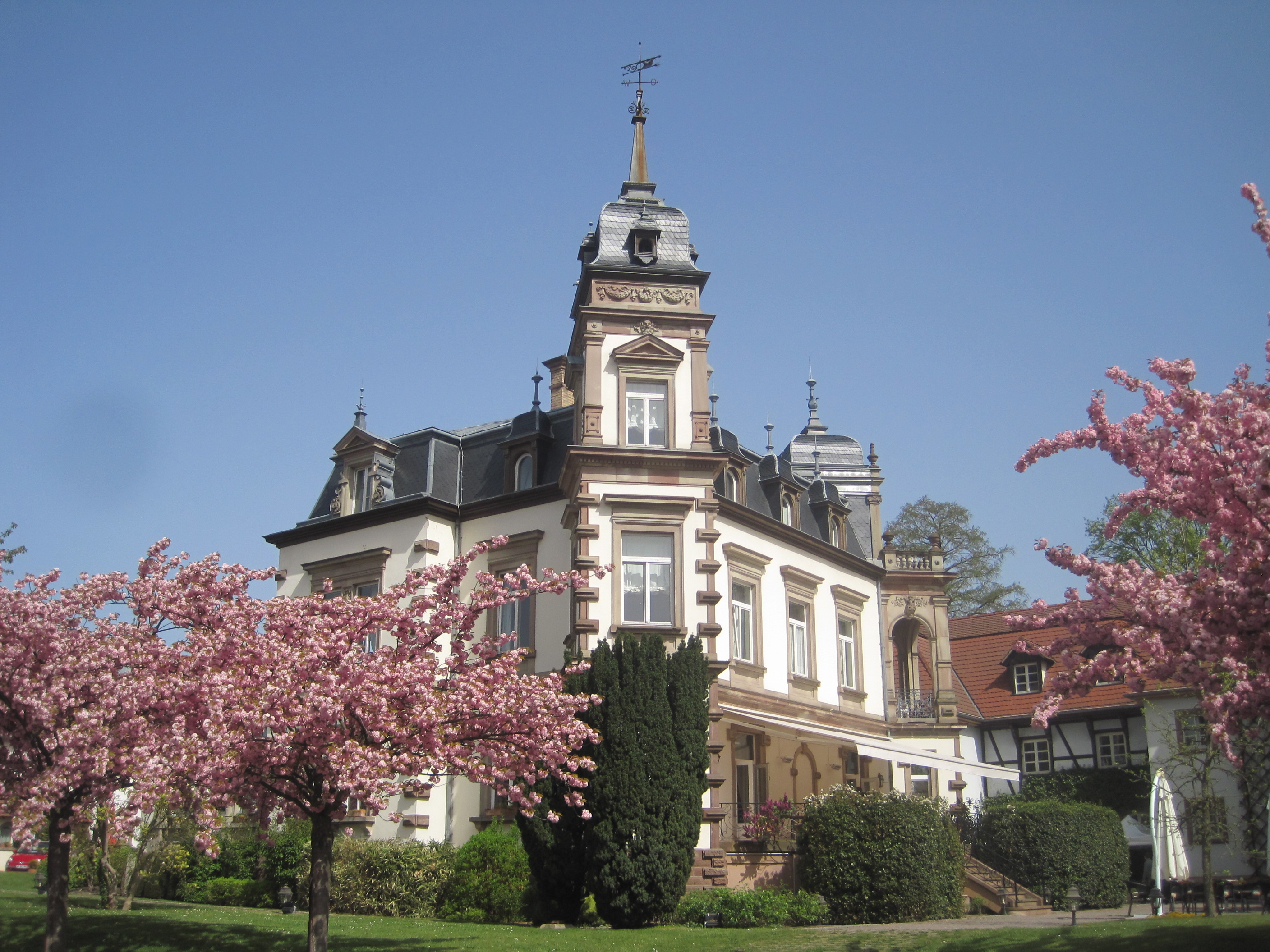 Das ehemalige Schloss Château de l’Île dient seit 1994 als Luxushotel. Von der 1891 im Neorenaissancestil errichteten Anlage (unter Verwendung von Elementen eines Vorgängerbaus aus dem 17. Jahrhundert) sind noch mehrere Gebäudeteile erhalten. Die Geschichte des Ostwalder Schlosses geht zurück bis ins Jahr 1226 und der Errichtung eines ersten Baus an dieser Stelle.